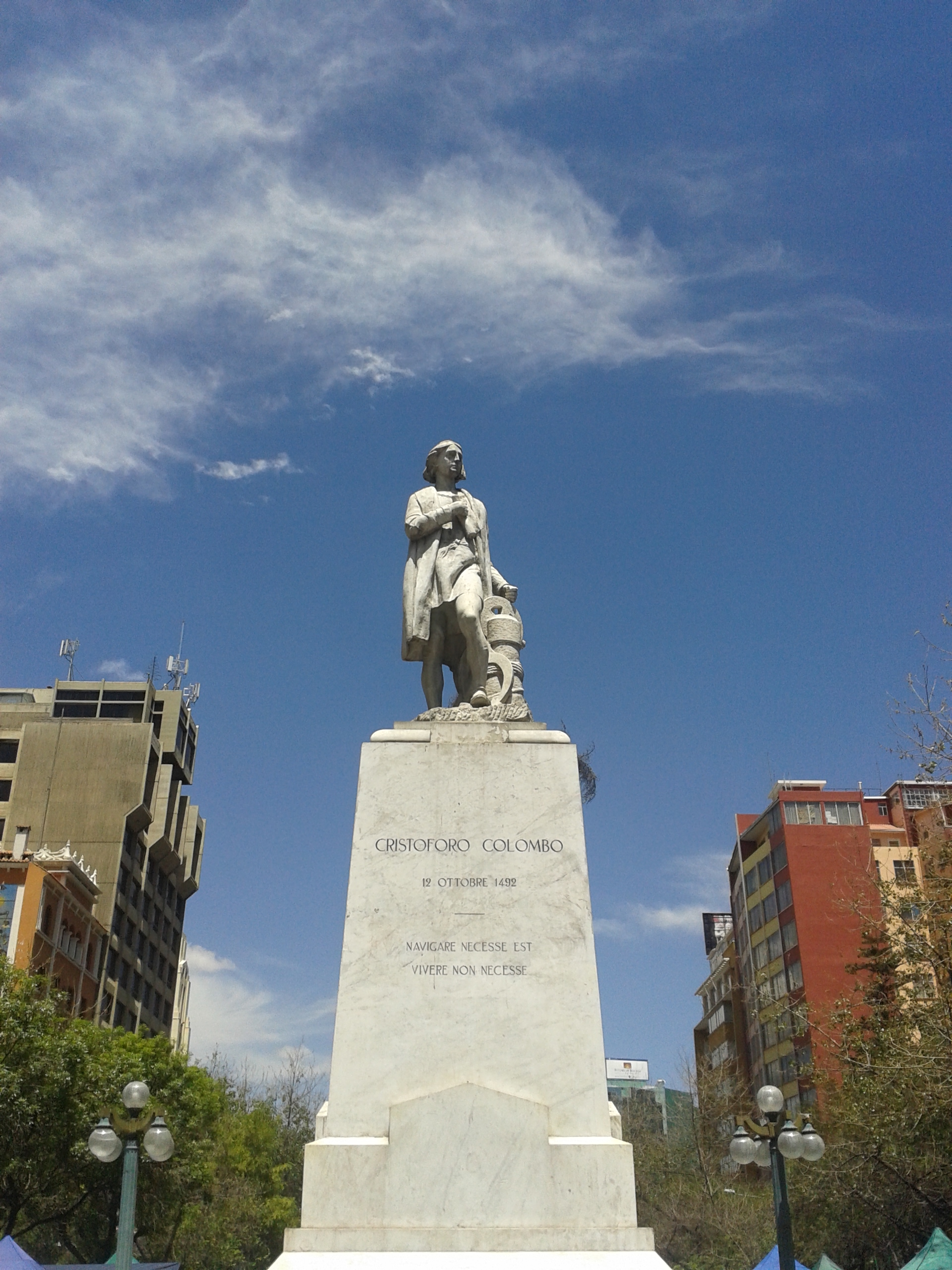 Cristoforo Colombo This medium shows the protected monument with the number L/00-216 in Bolivia.